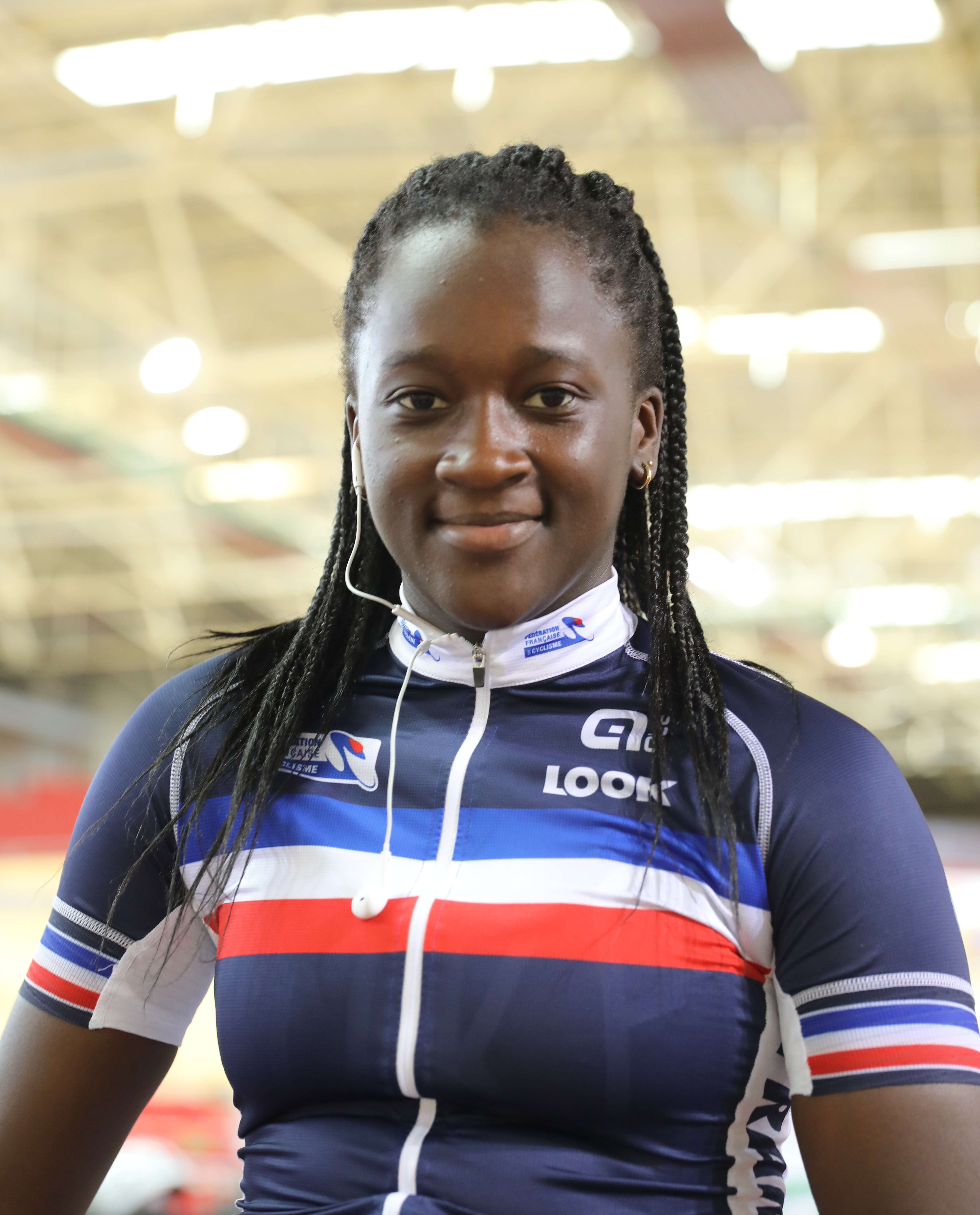 Marie-Divine Taky-Kouamé, französische Radsportlerin